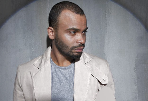 Мигель (Режиссер и продюсер)